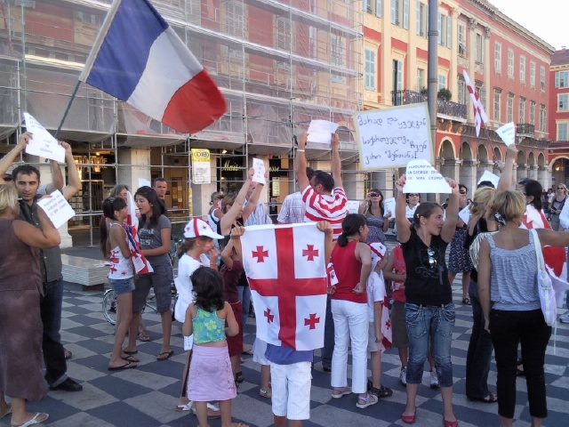 Протест грузинских граждан в Ницце против вторжения России в Грузию